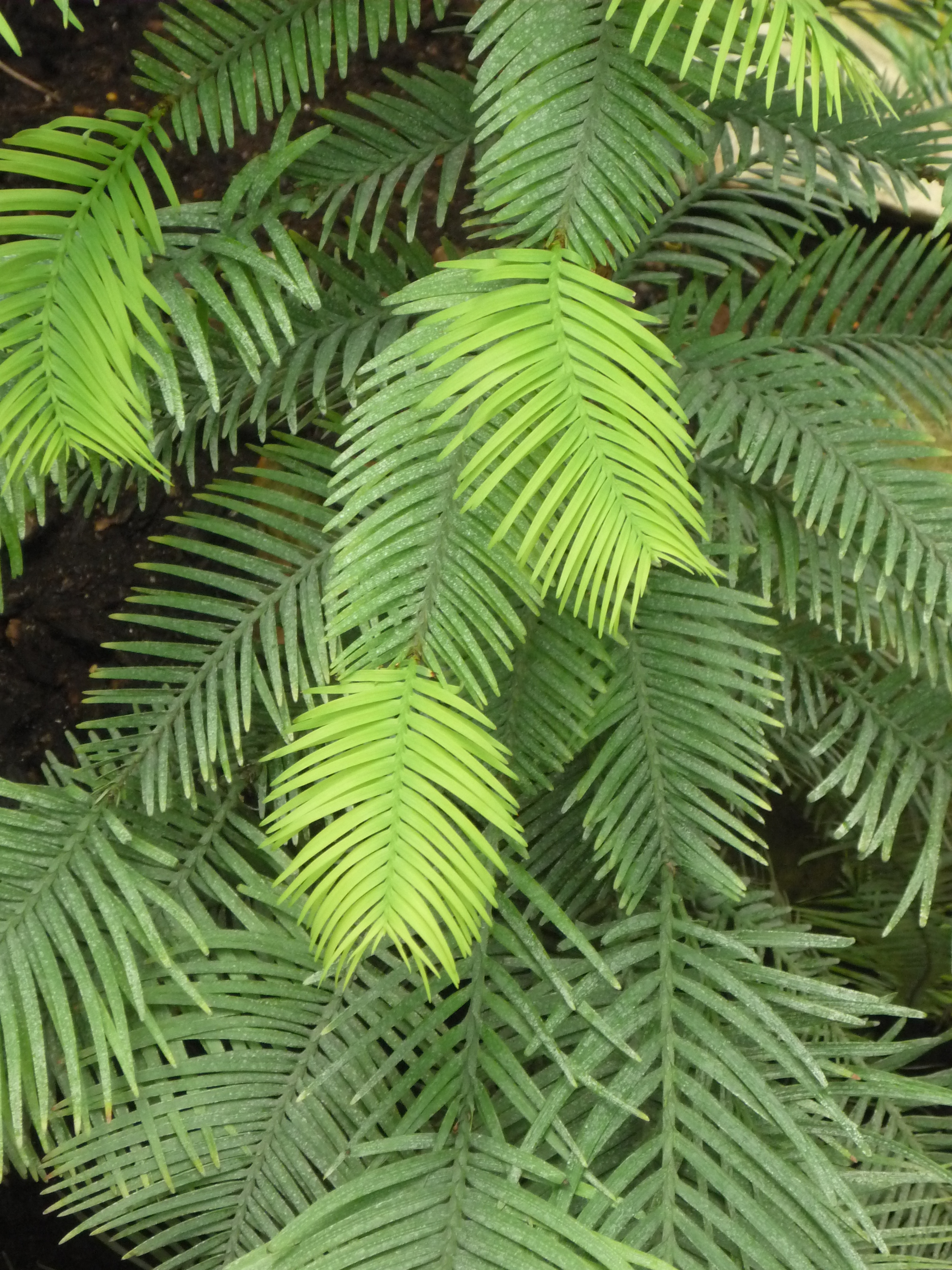 Wollemia nobilis, serres du jardin des plantes de Paris, France